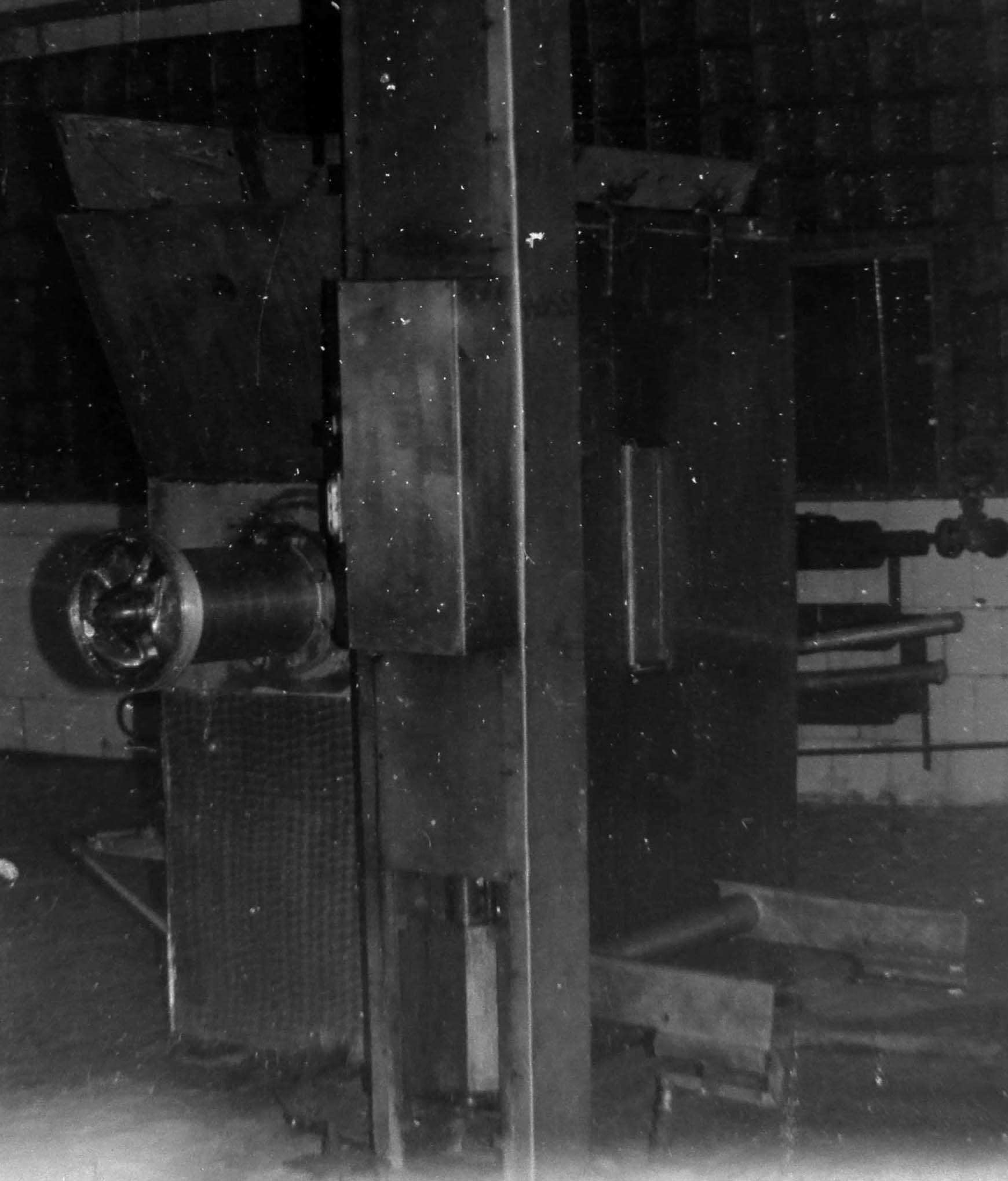 maszyna rozdrabniająca wilk